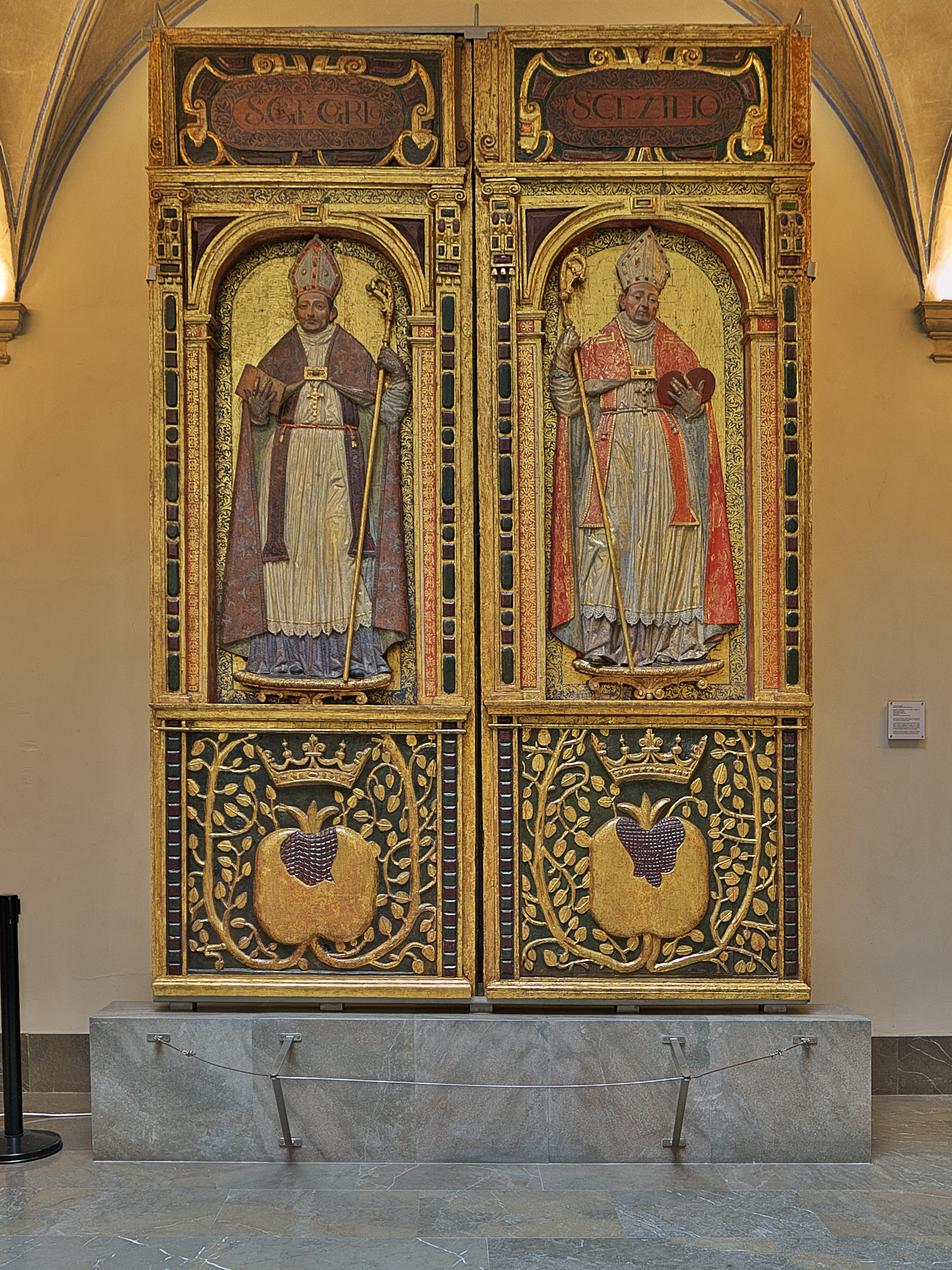 Bajorelieve de las puertas, madera policromada, de la capilla del primitivo Cabildo de la ciudad. Alonso de Mena con trazas de Francisco Díaz del Rivero. La policromía es de Pedro de Raxis.